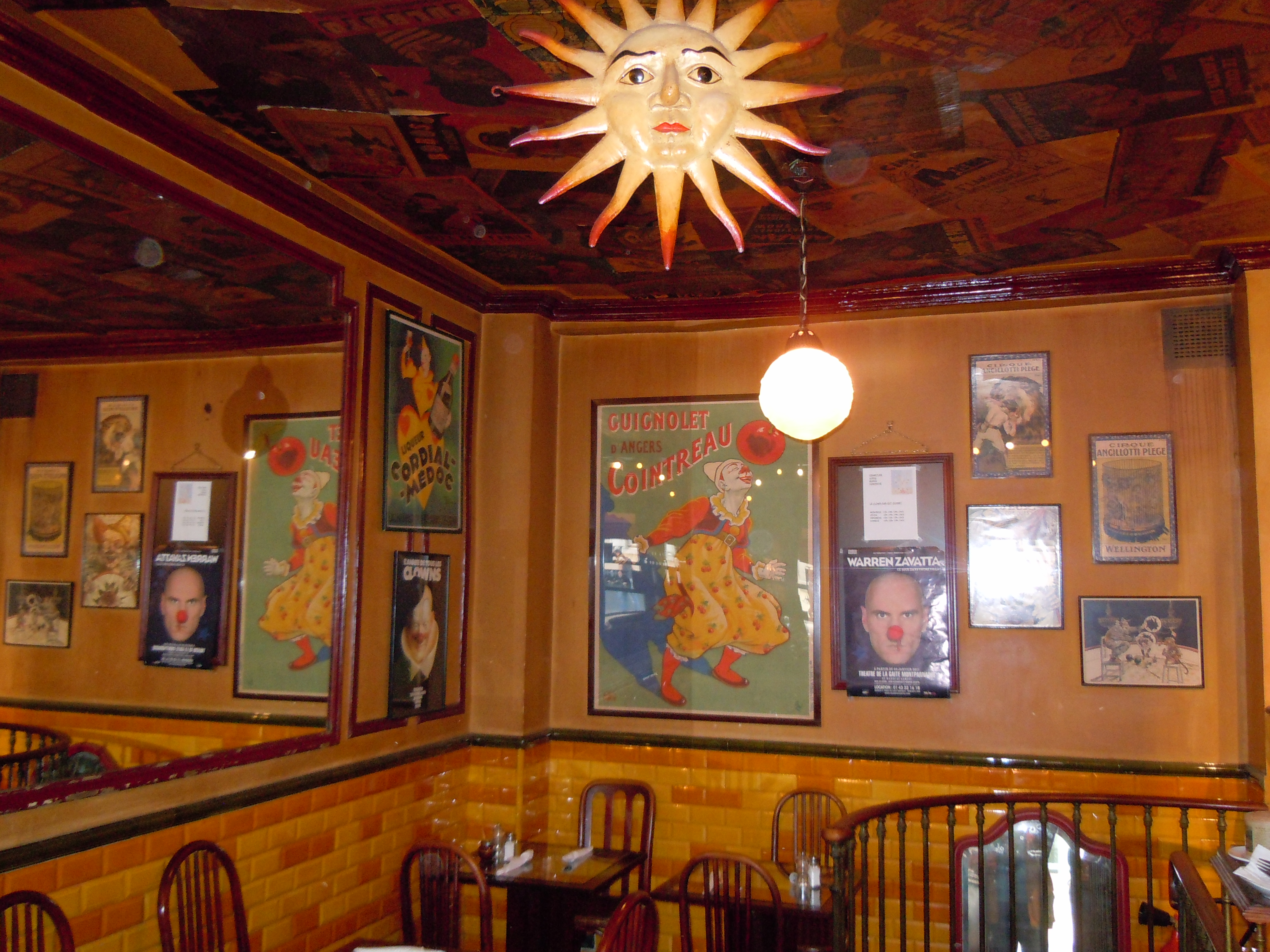 L'intérieur du Clown-Bar 114 rue Amelot 75011 Paris